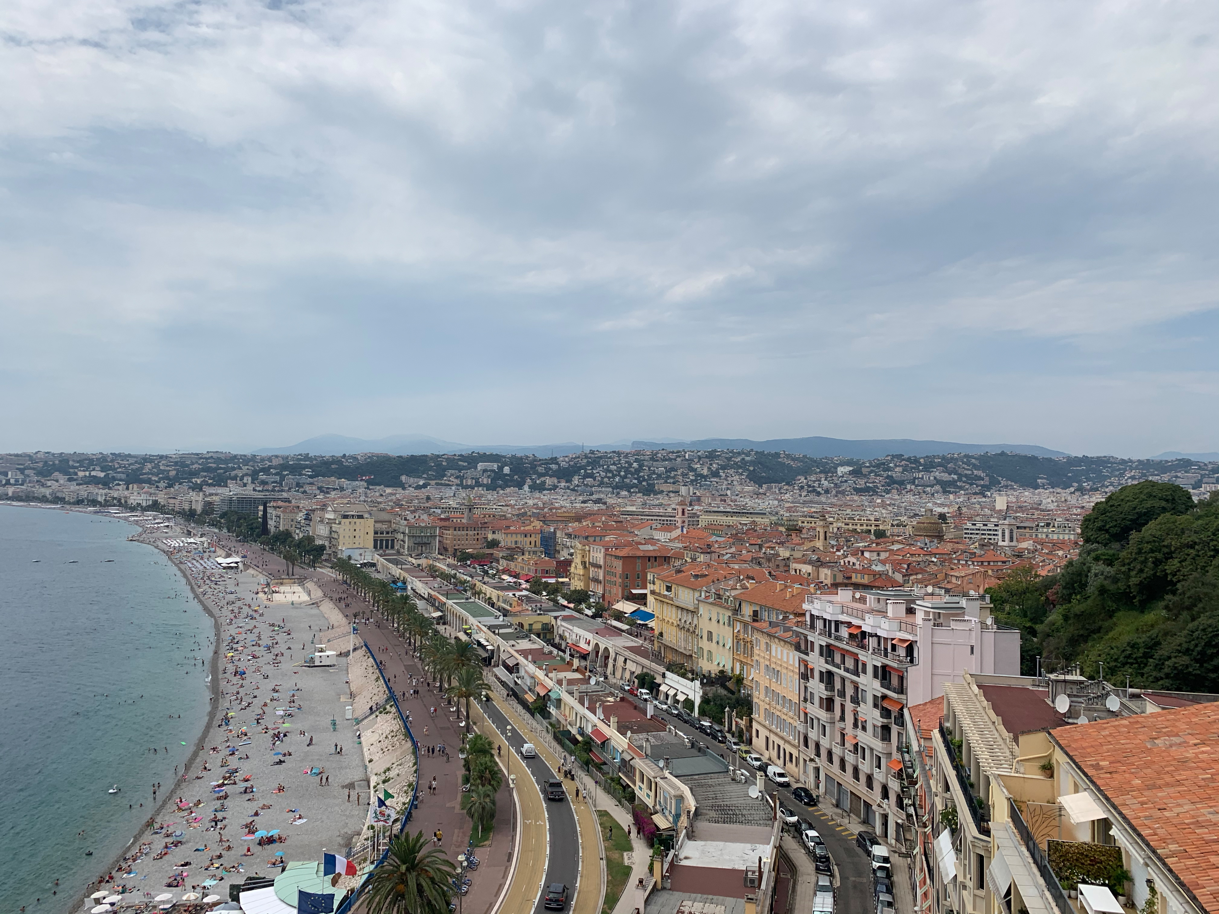 Menschen sitzen am Strand oder spazieren auf der Promenade des Anglais in Nizza. Das Foto ist vom Bellanda Tower aus fotografiert.